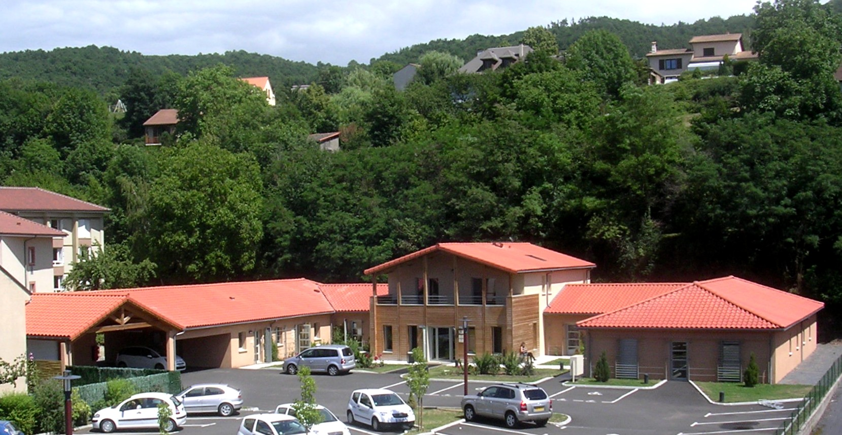 Maison médicale de Massiac, Cantal, France